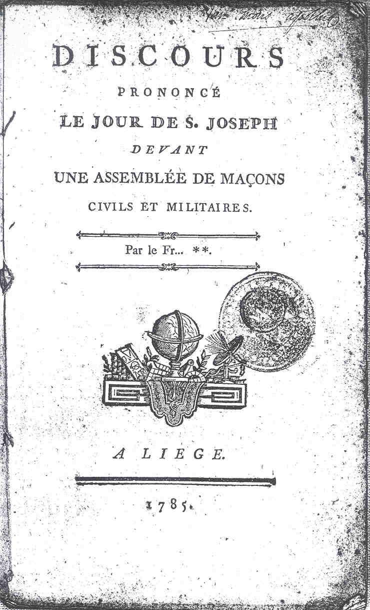 DISCOURS prononcé le jour de S. Joseph devant une assemblée de maçons civils et militaires, à Liège, 1785, avec la signature ex-libris du savant bruxellois "Jean-Baptiste VAN MONS, apothic(arius)